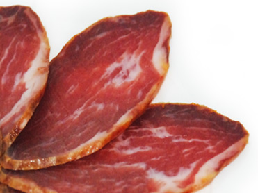 Lomito Ibérico de Presa Selección